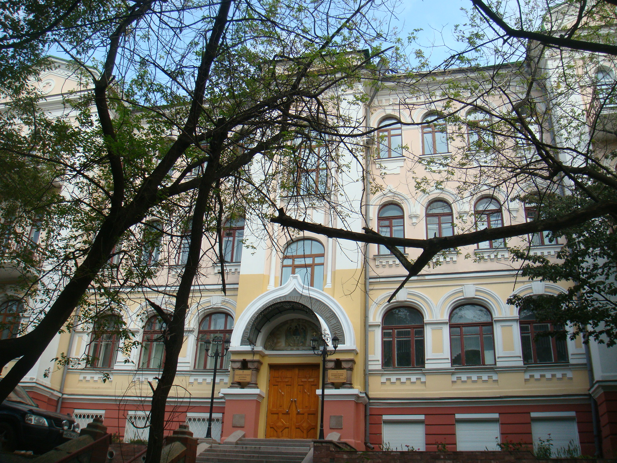 Здание владивостокской духовной консистории (Приморский край, Владивосток, пологая улица, 65)